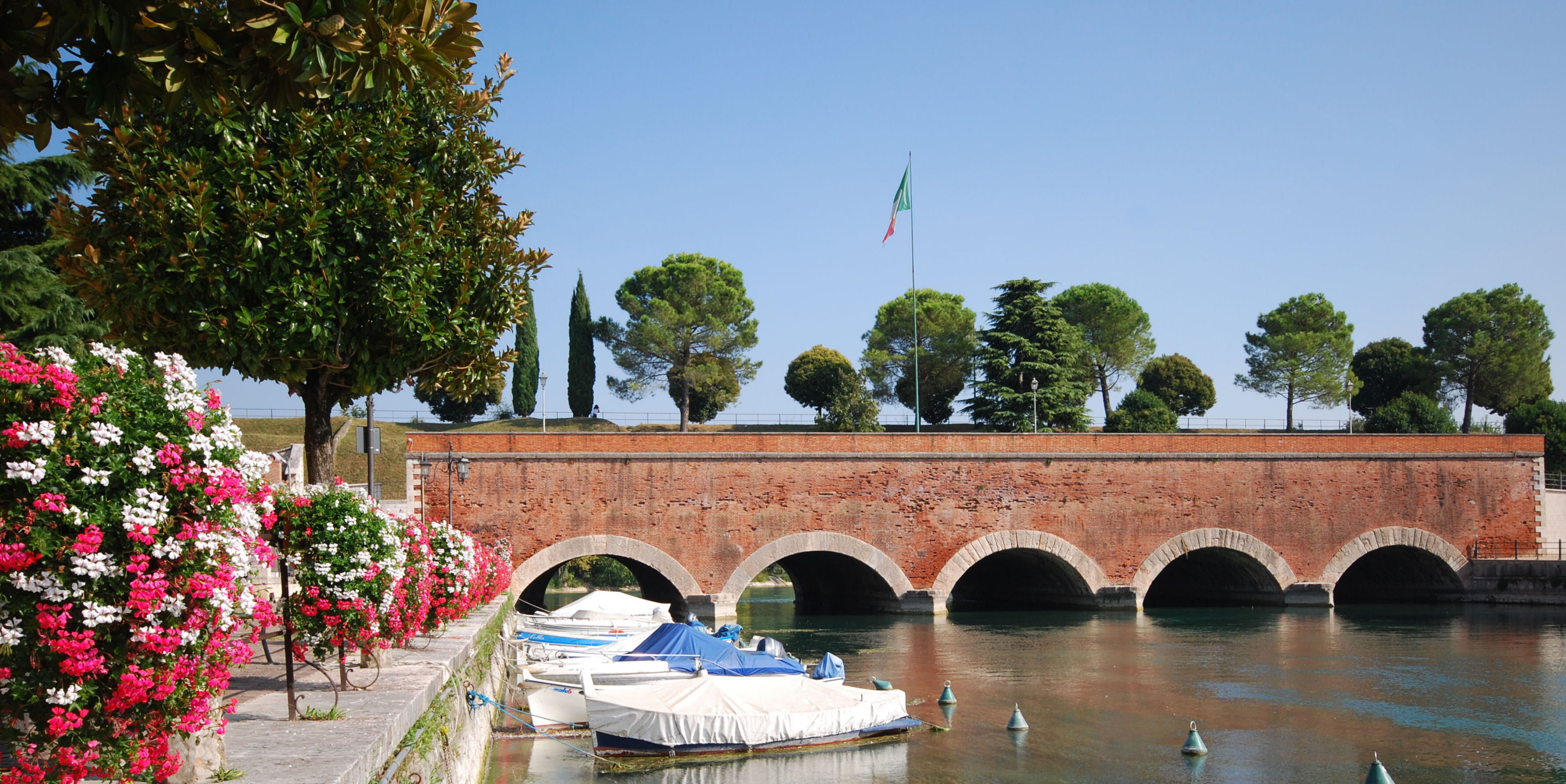 Ponte dei Voltoni This is a photo of a monument which is part of cultural heritage of Italy.